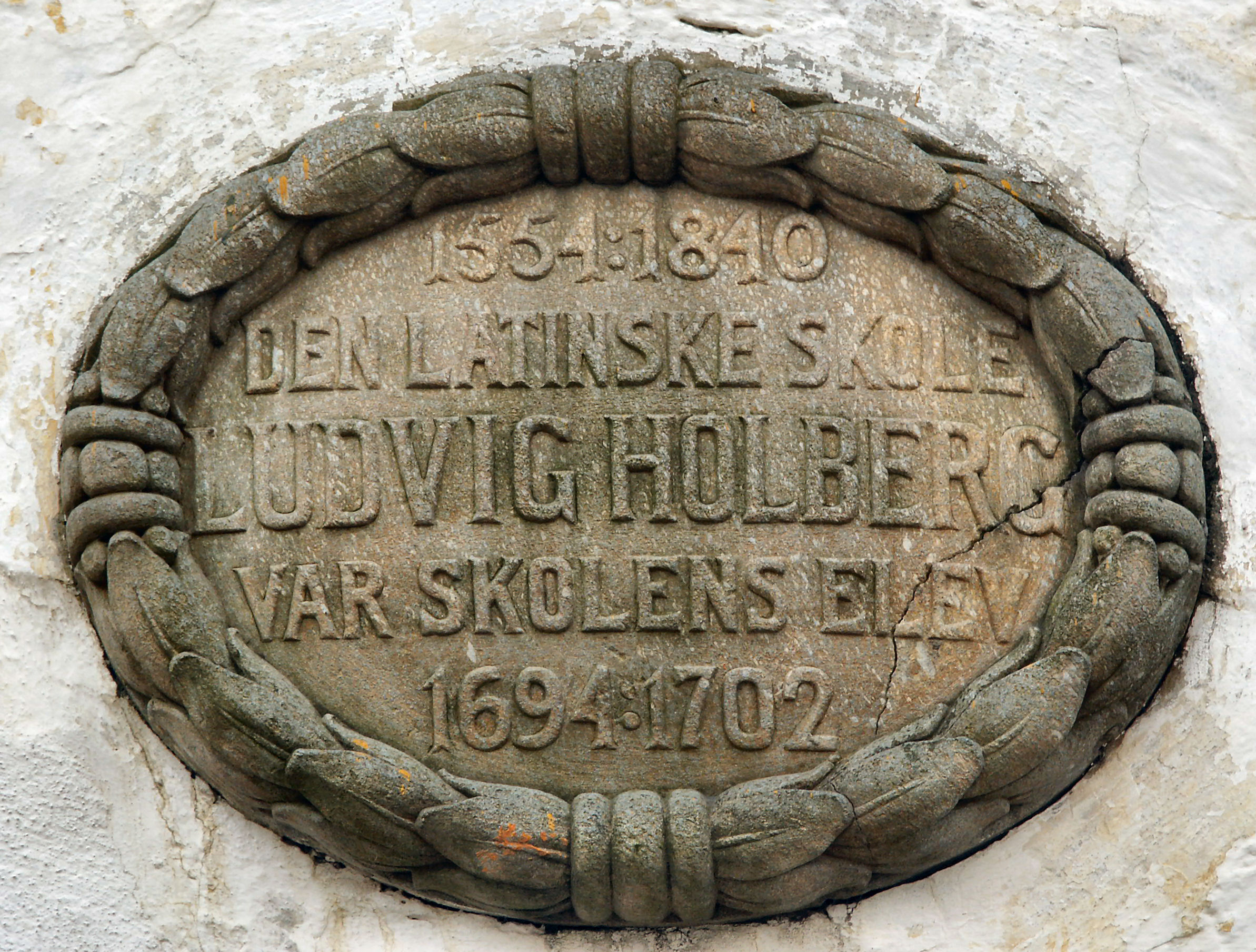 Inscription about Ludvig Holberg at Bergen katedralskole in Bergen, Norway